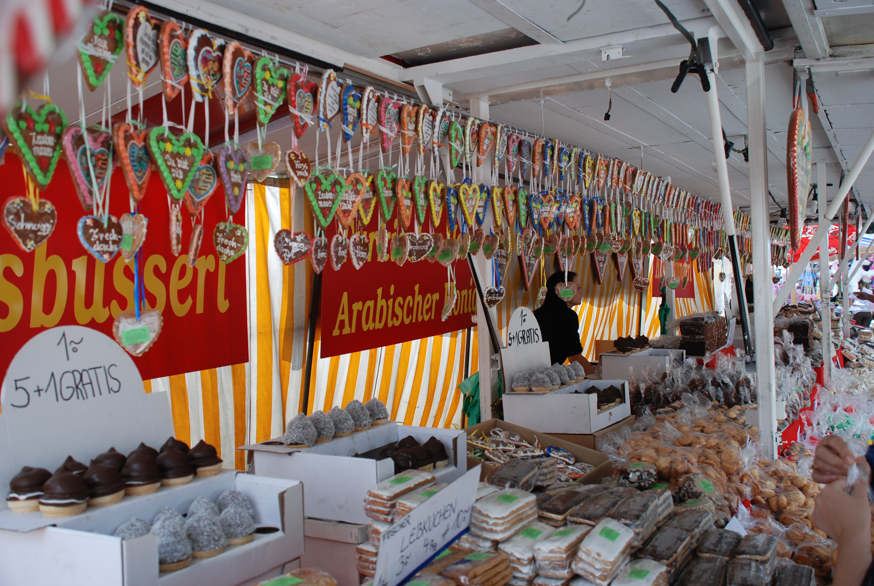 Kirtagsstand für Naschereien auf der Hebalm